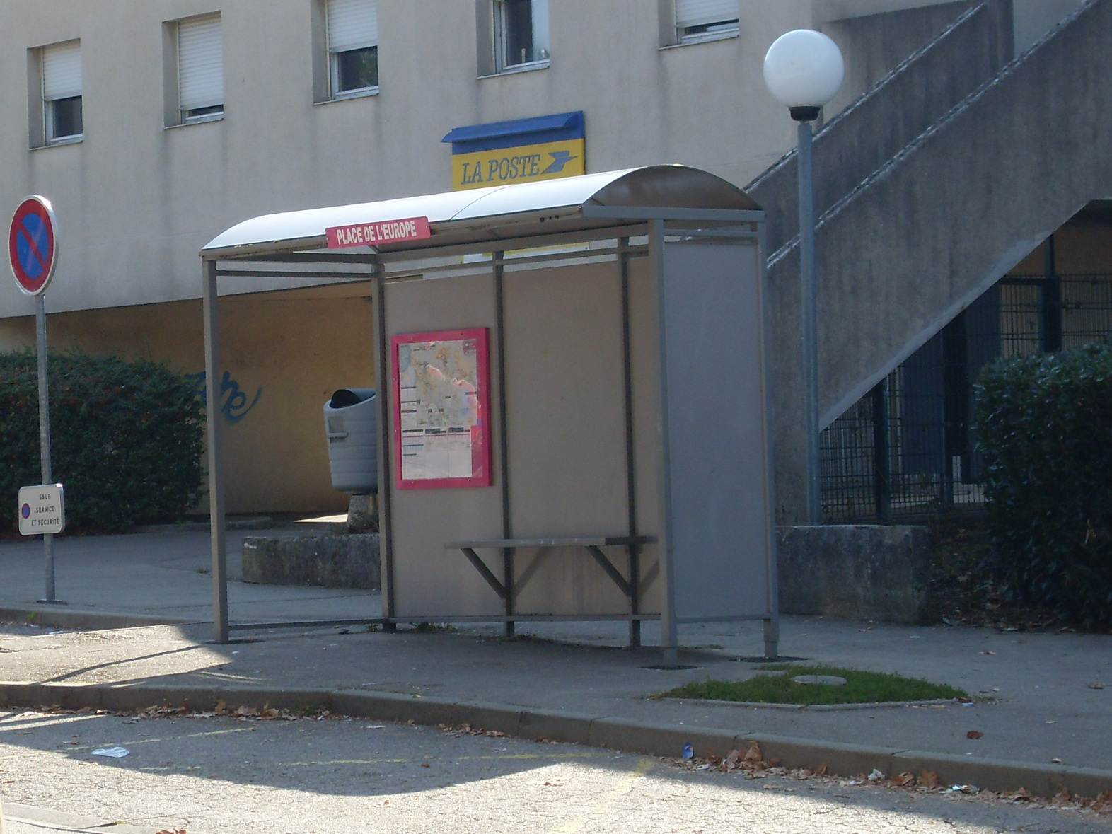 Arrêt de bus "Place de l'Europe" à Villefontaine - Isère